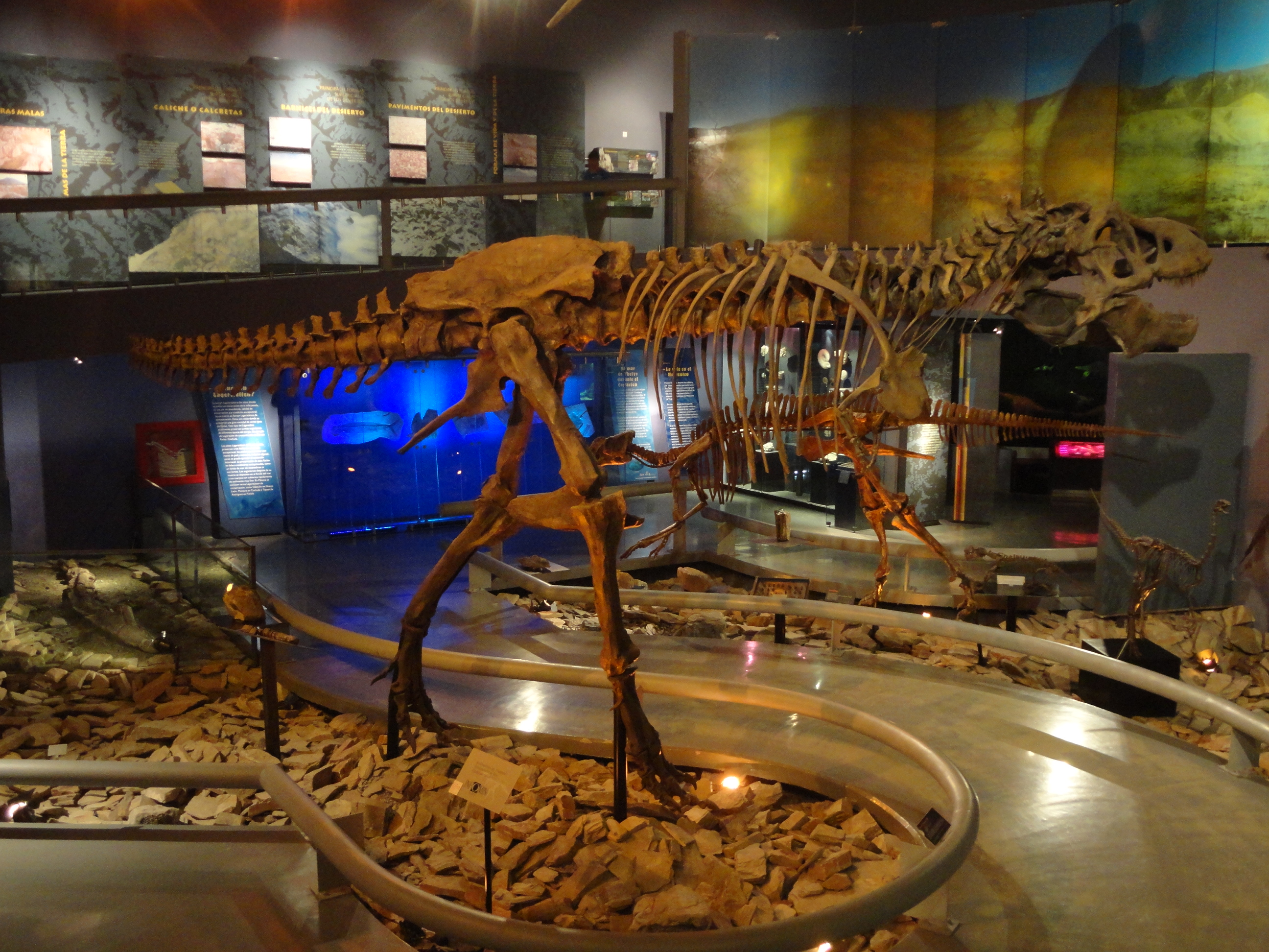 Sala desierto y su pasado, Museo del Desierto en Saltillo, Coahuila, México.